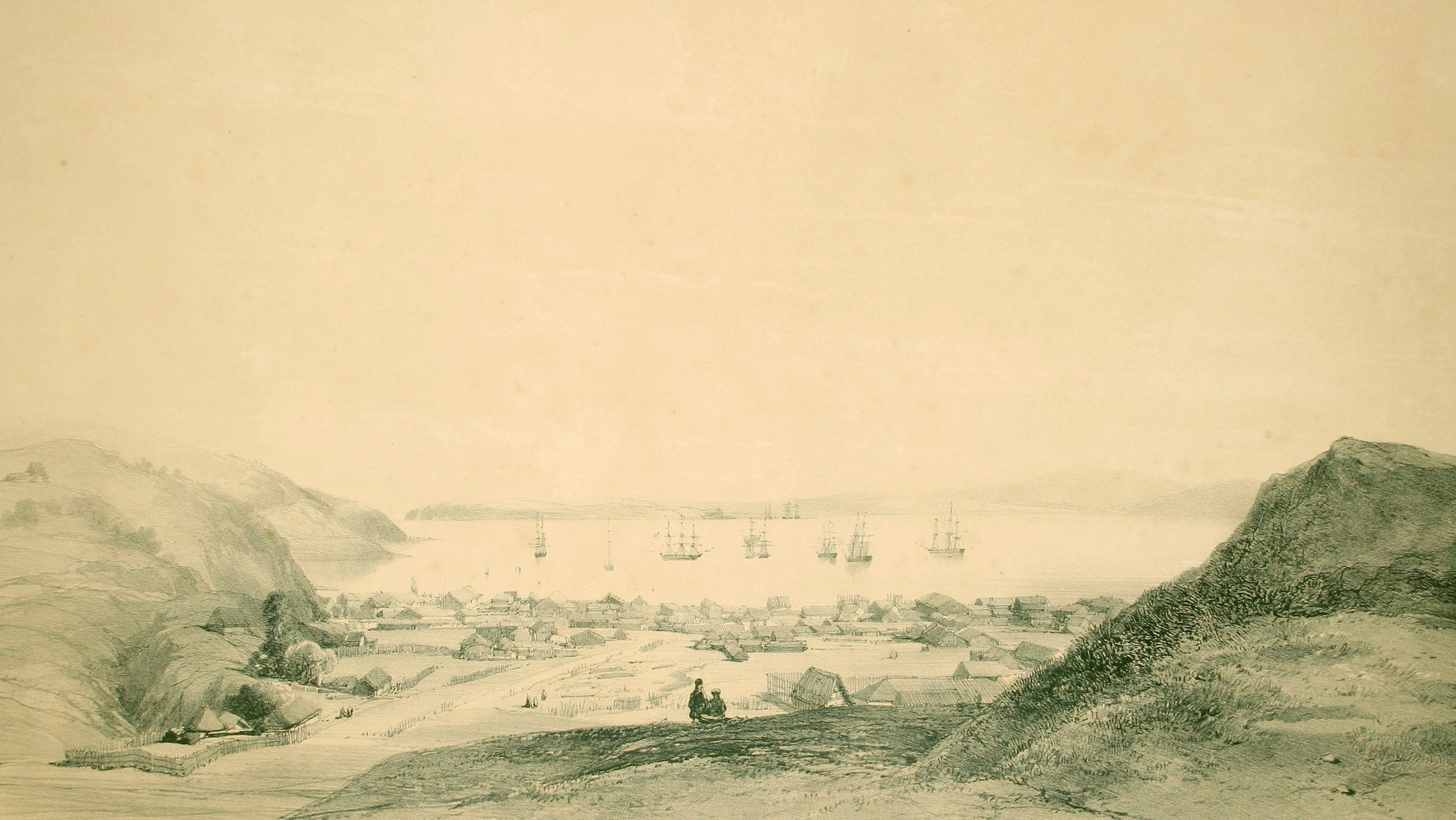 rade de Talcahuano. Atlas pittoresque, planche 33 bis